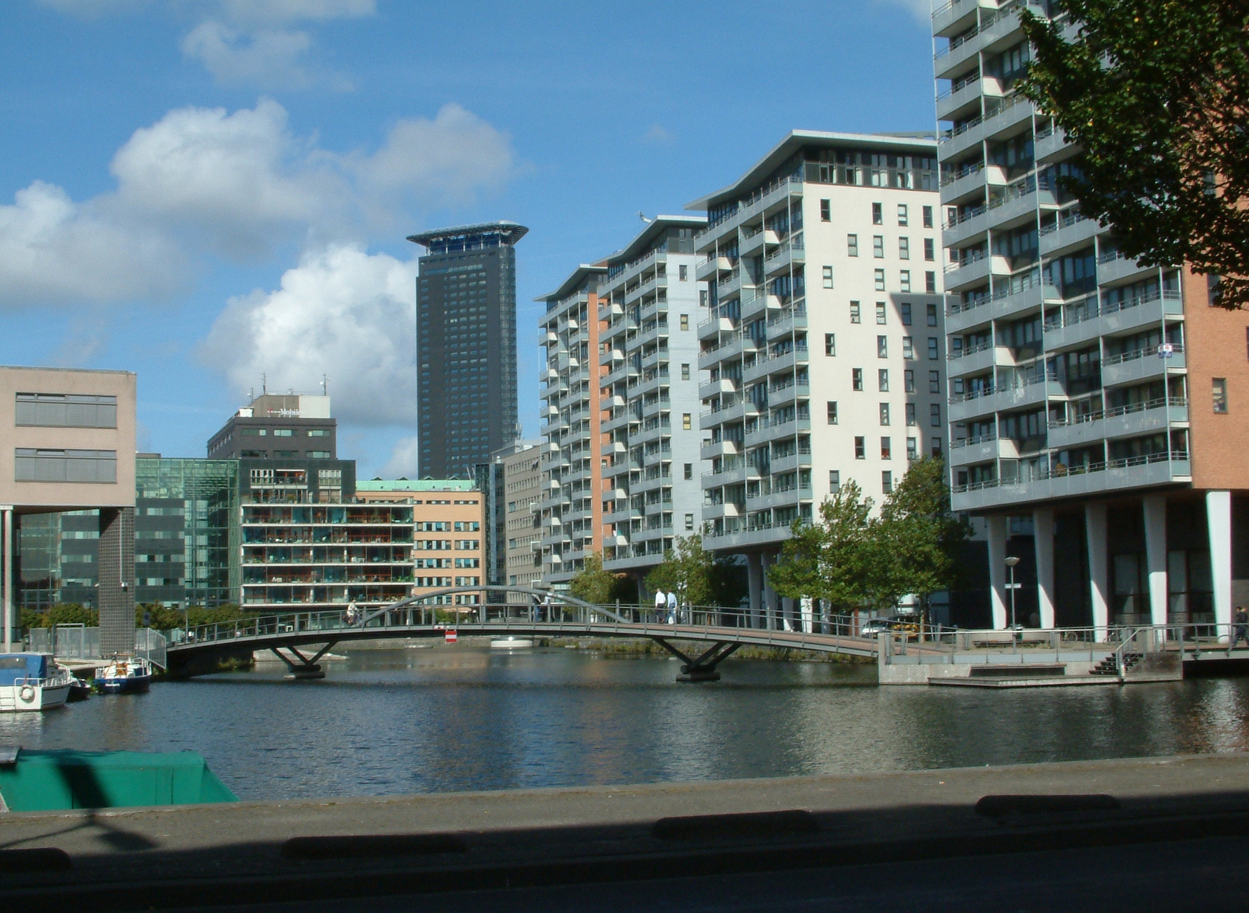 Brug in Den Haag